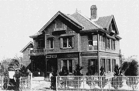 昔のインブリー館の外観